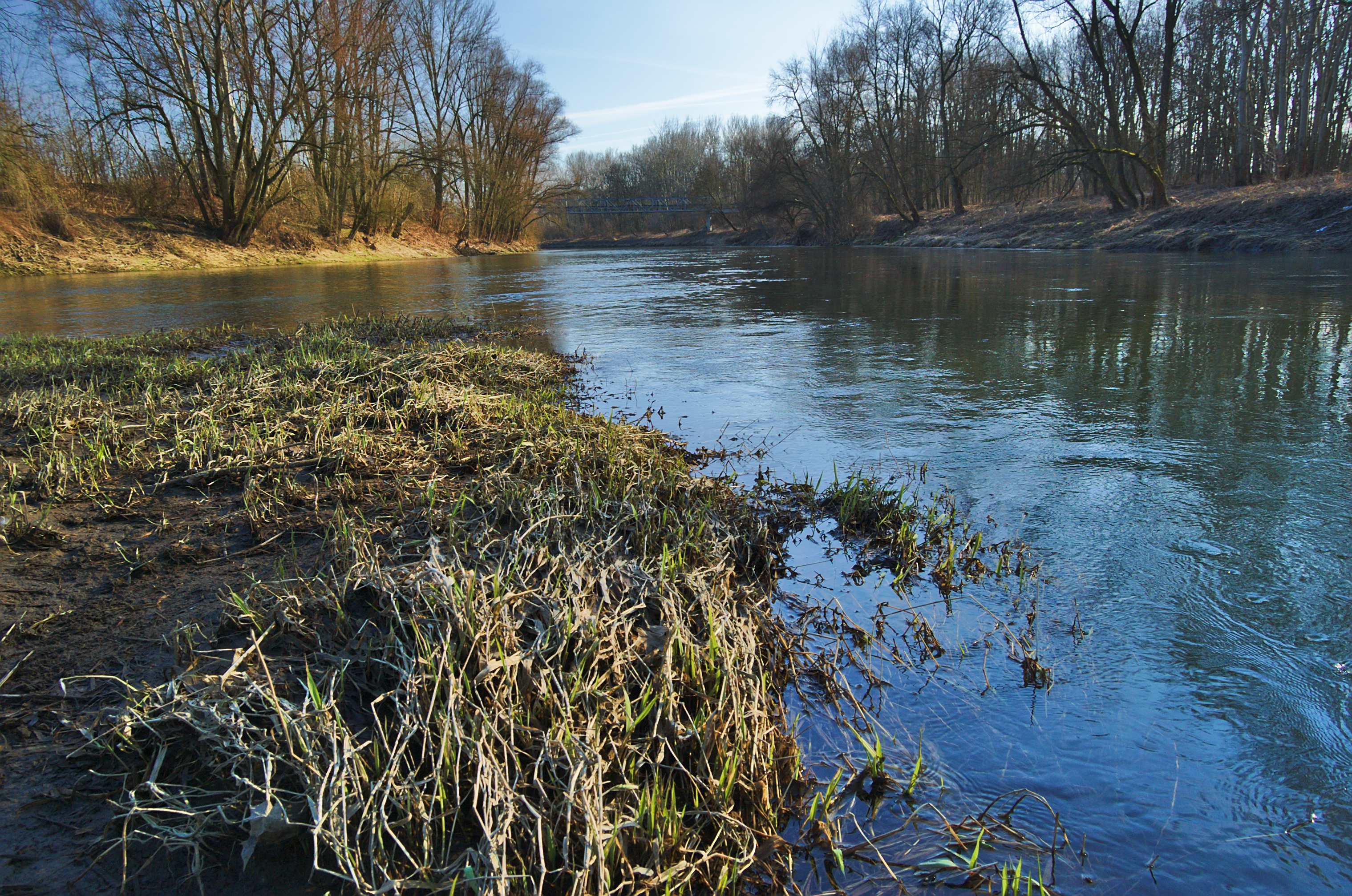 Soutok Moravy a Bečvy, Tovačov, okres Přerov